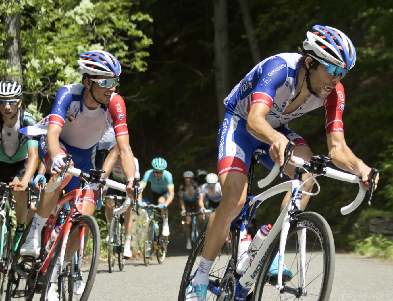 GIR40235 pinot & co